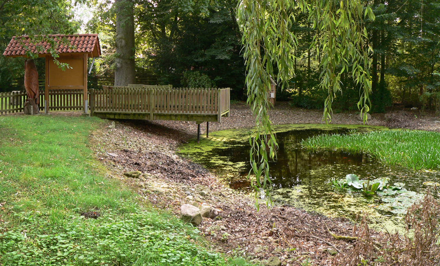 Früherer Schlossteich als einer von vier Teichen, mit Infotafel zur Schlossgeschichte